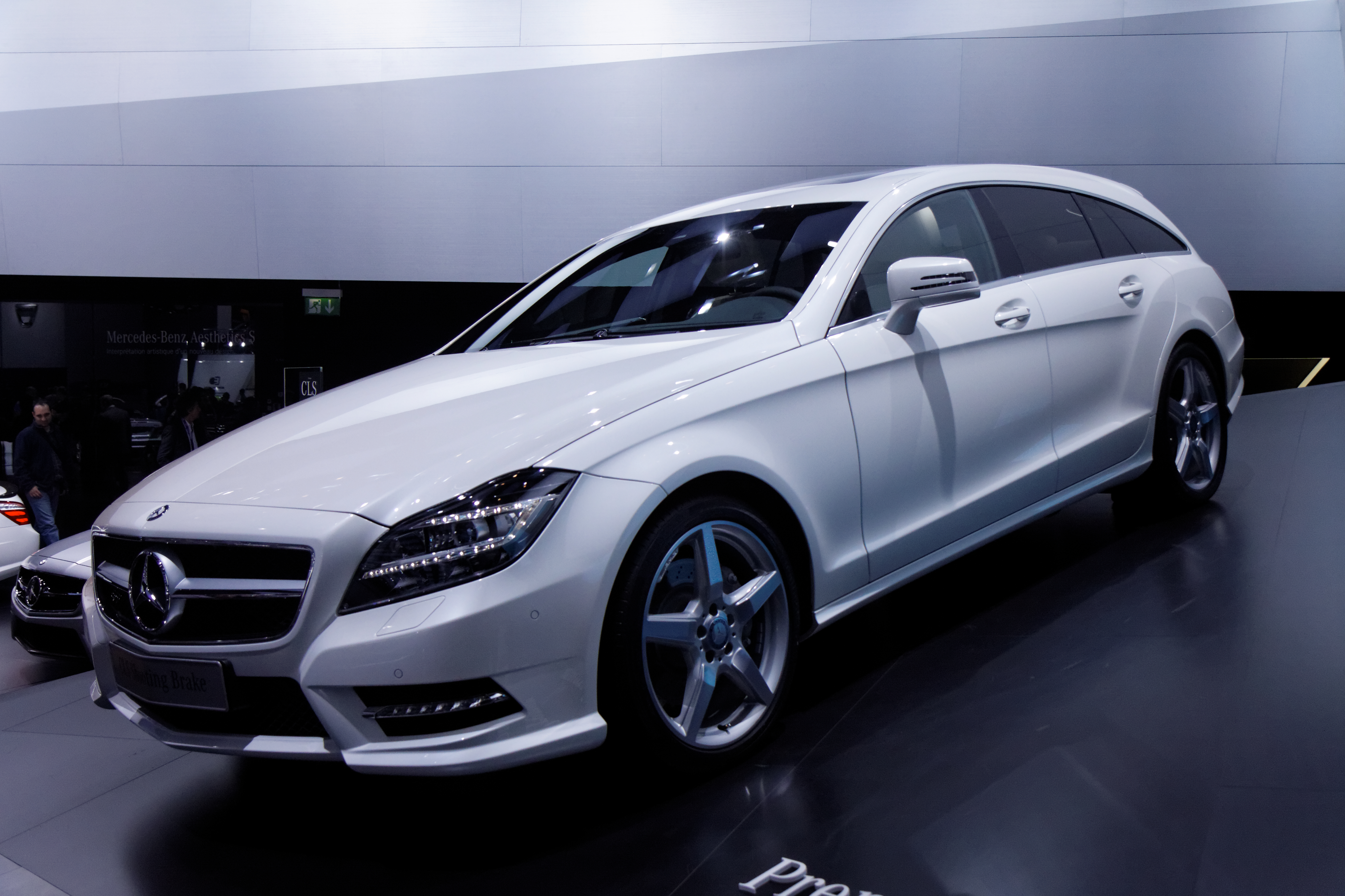 Une Mercedes CLS shooting break présentée lors du Mondial de l'automobile de Paris 2012.